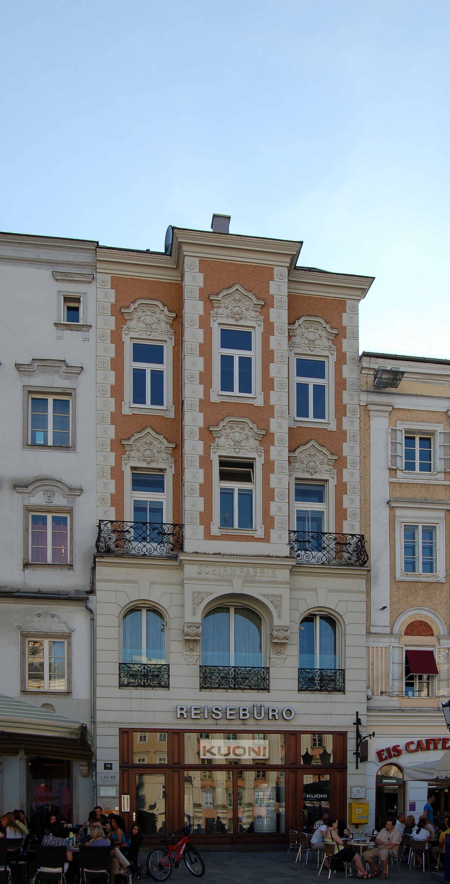 Das Haus am Hauptplatz 14 in Linz (Oberösterreich).